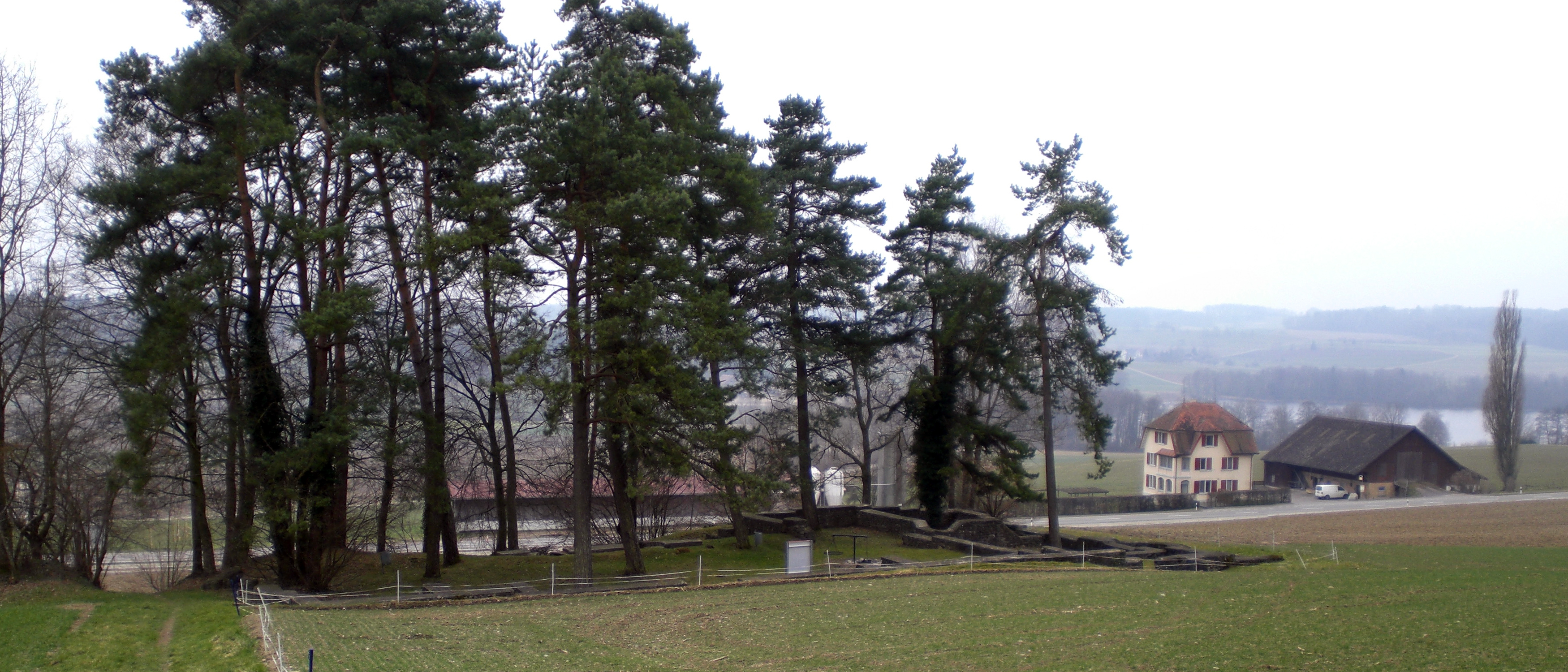 Römische Villa Stutheien, Thurgau. Gesamtansicht